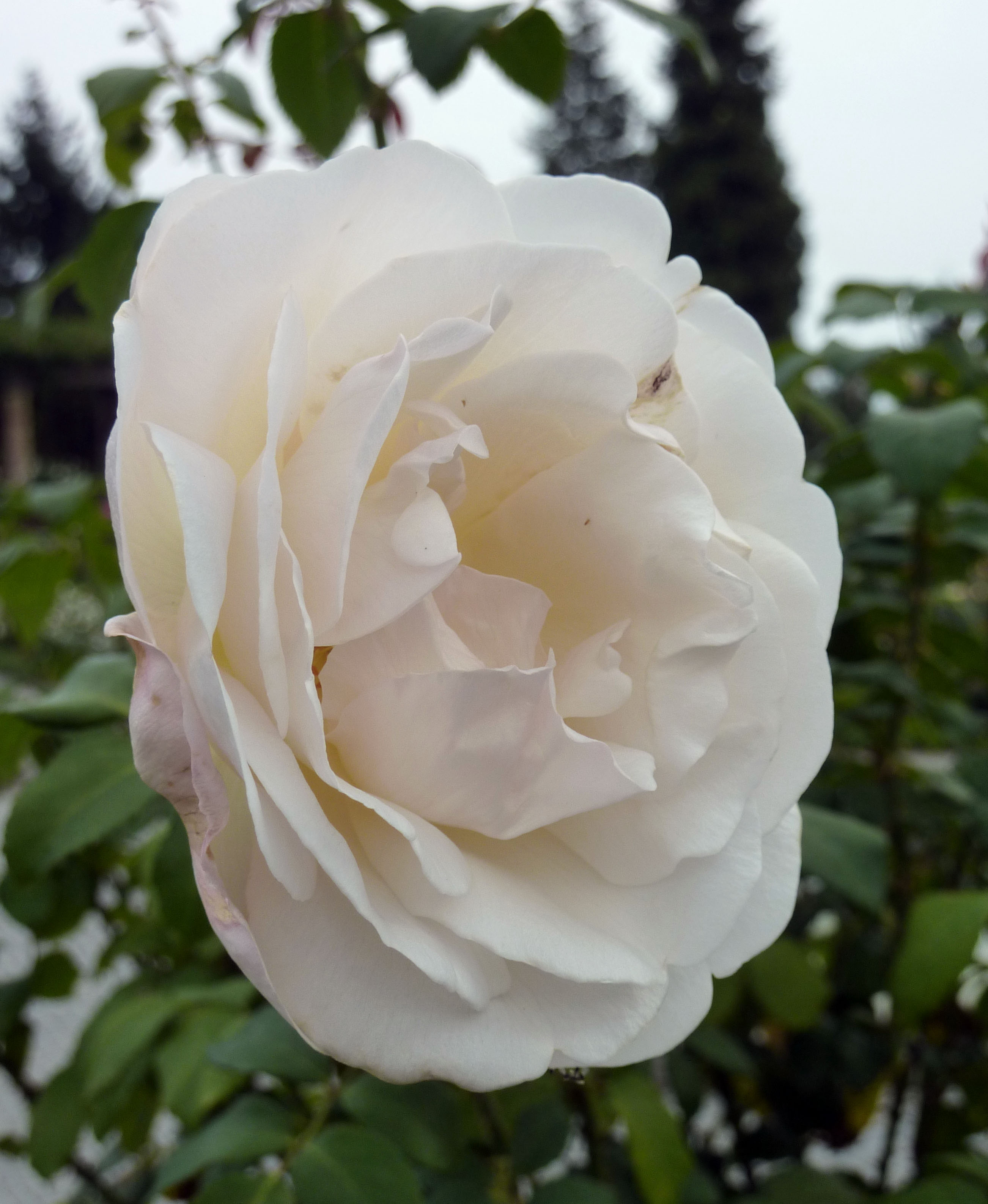 Rosa 'Marie-Luise Marjan'